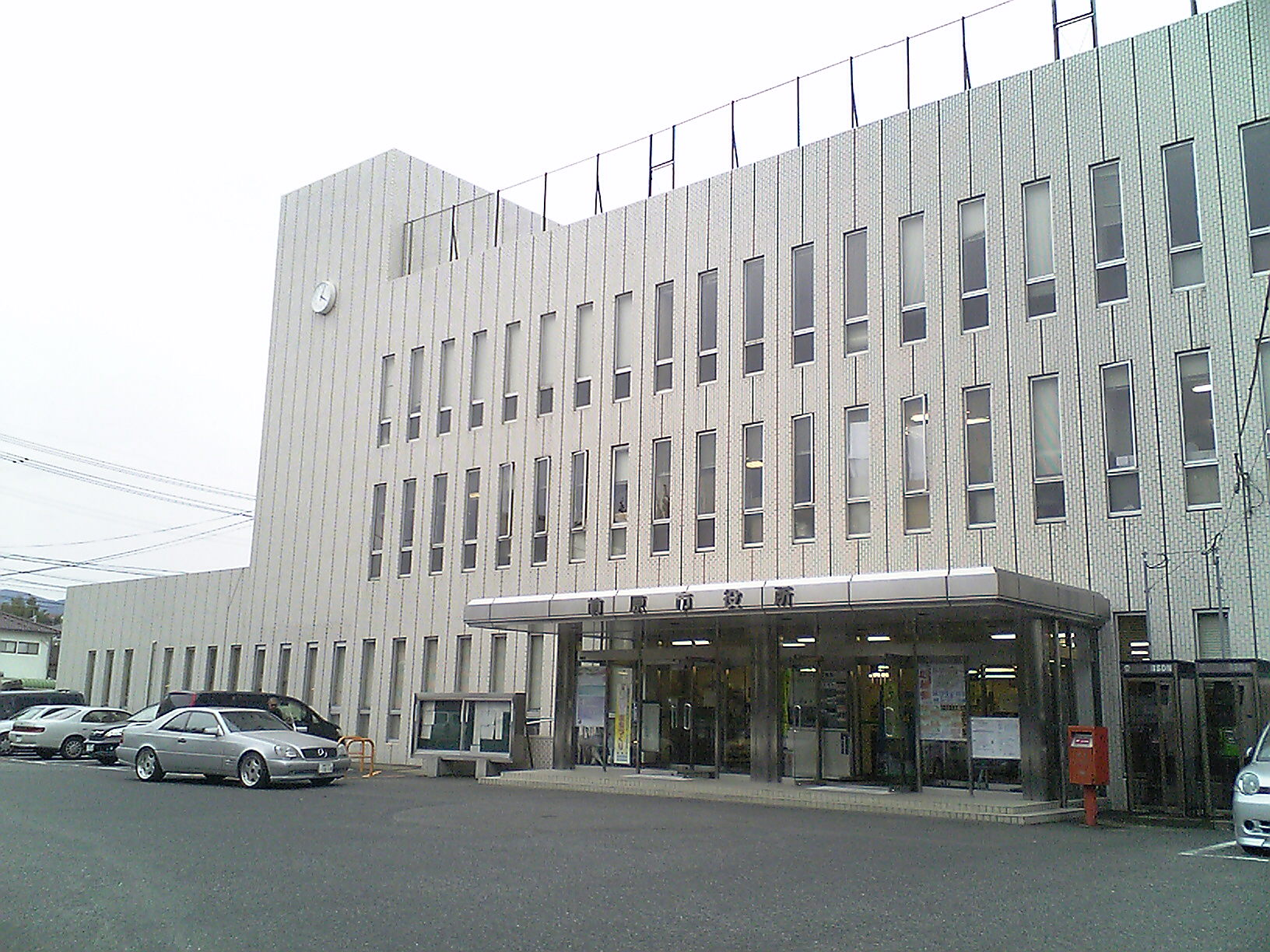 糸島市役所（福岡県糸島市）・旧：前原市役所